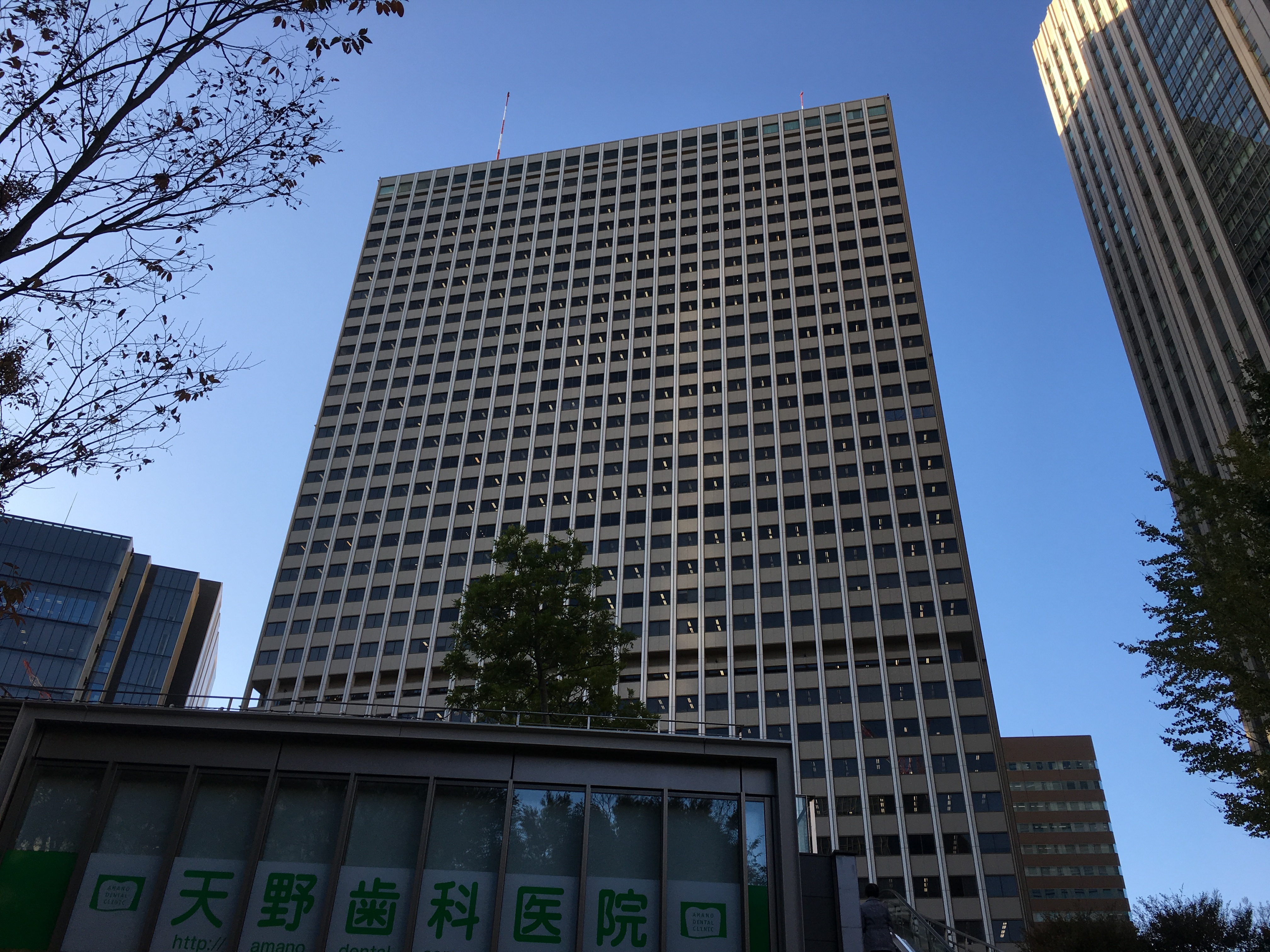 霞ヶ関ビルディング (Kasumigaseki building)